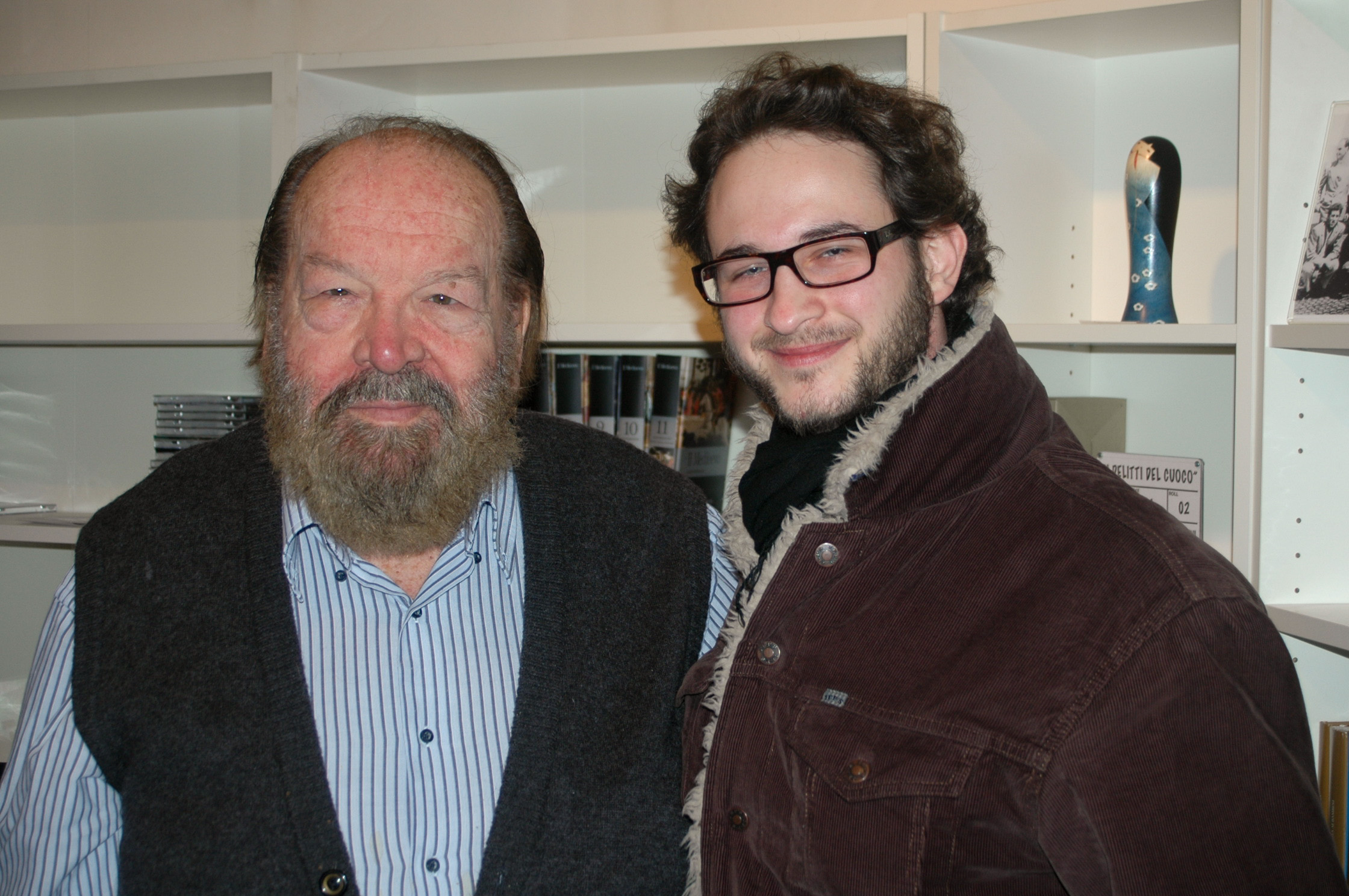 Der 80-jährige Bud Spencer trifft Regisseur Karl-Martin Pold